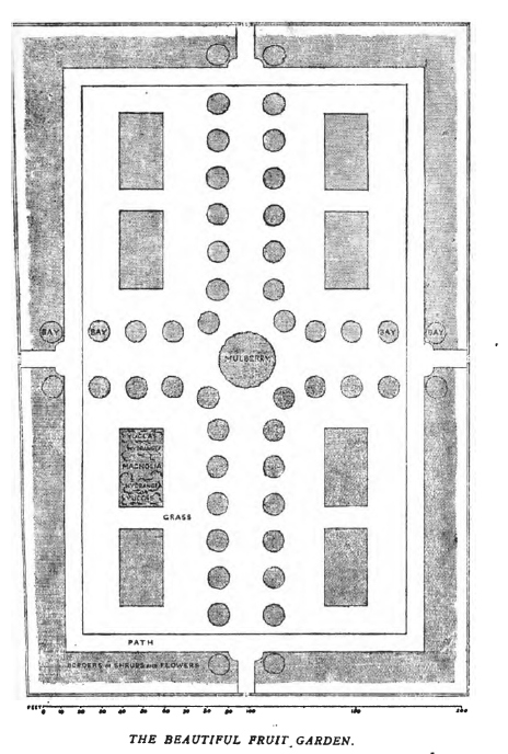 obrázek v knize Colour in the Flower Garden,krásná ovocná zahrada